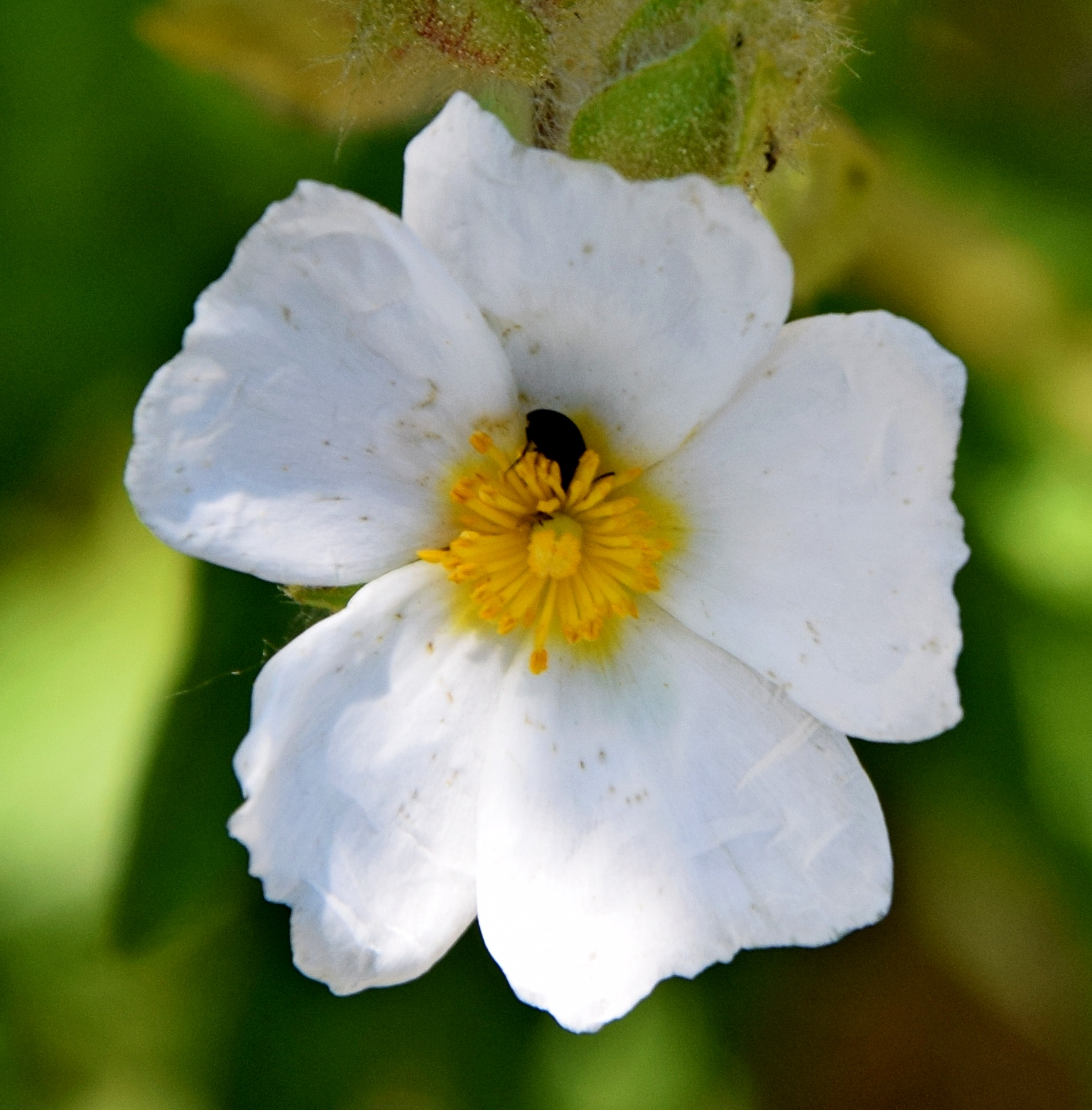 Cistus monspeliensis w okolicach Narbony we Francji